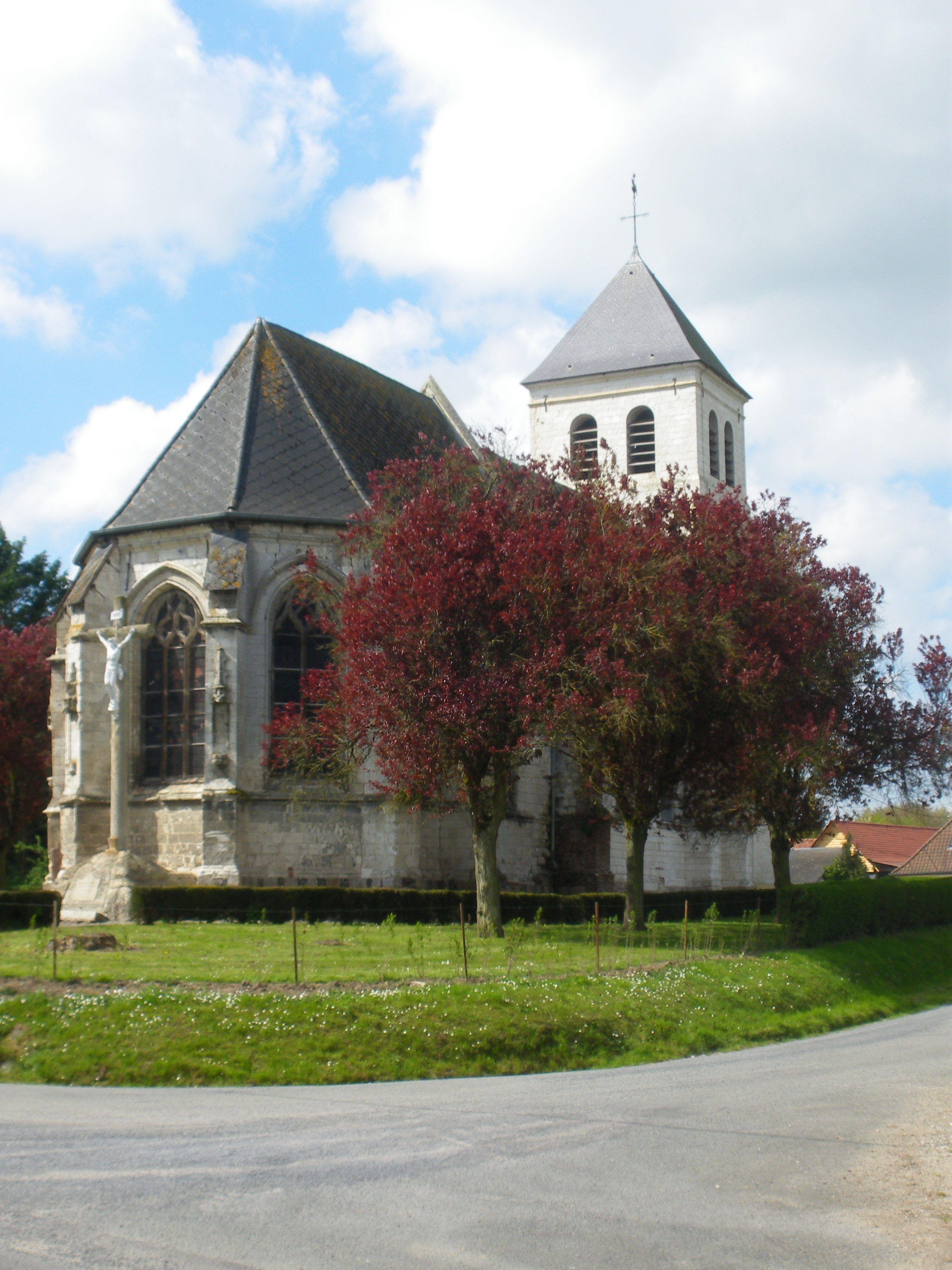 Vue de l'église Saint-Vaast de Rebreuviette. .